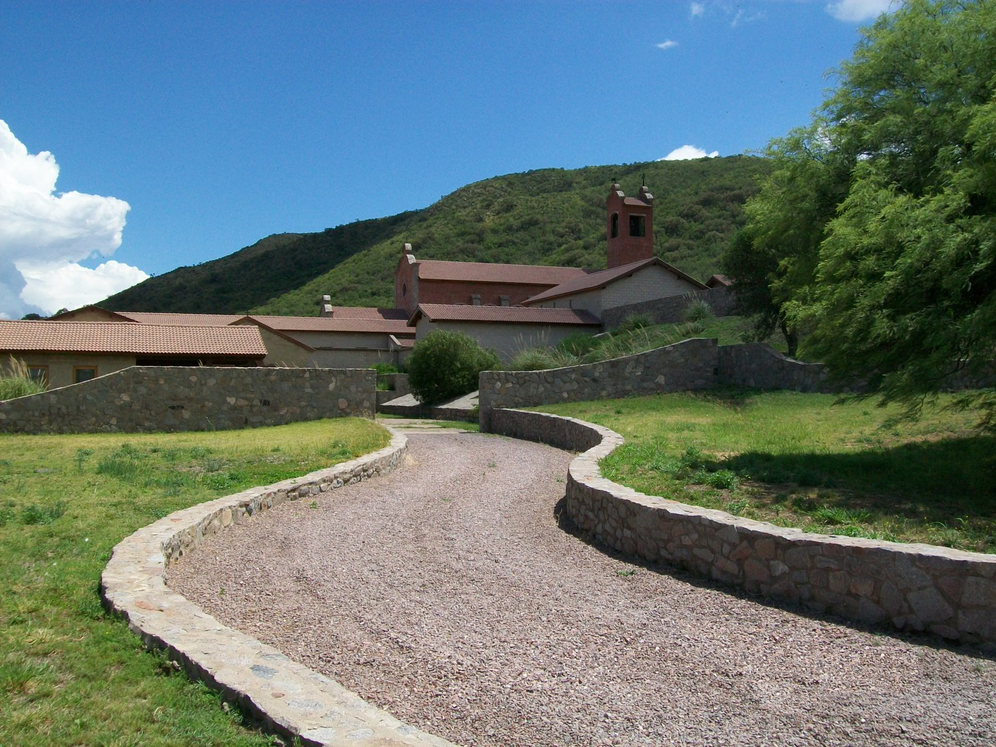 frente